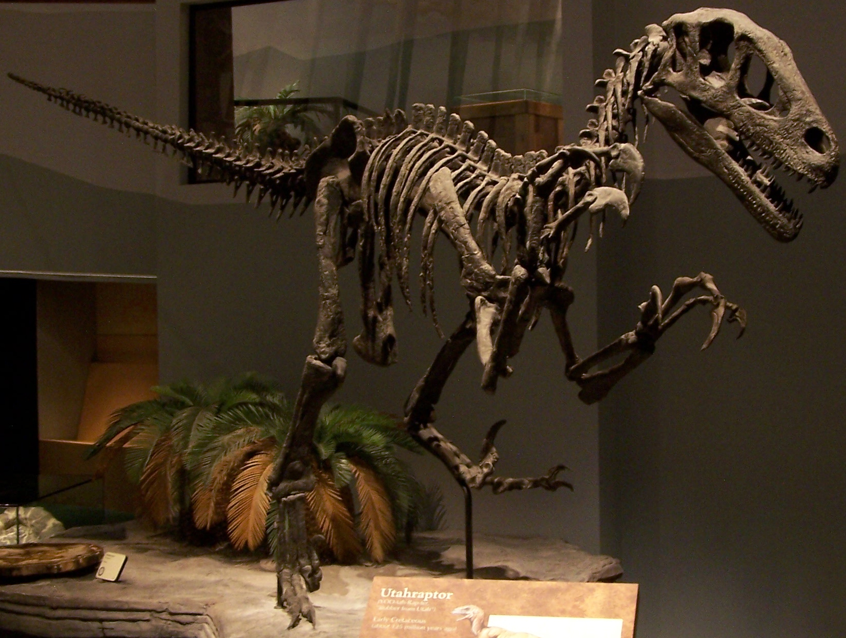 A Utahraptor csontváza.